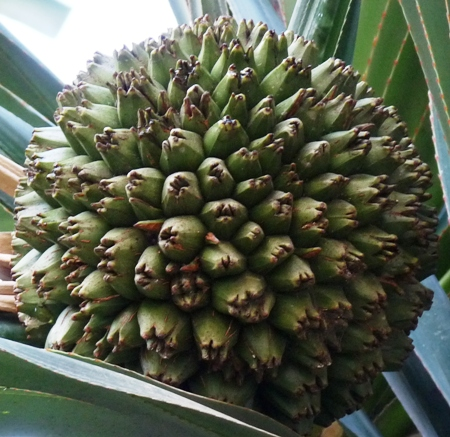 Frucht von Pandanus utilis